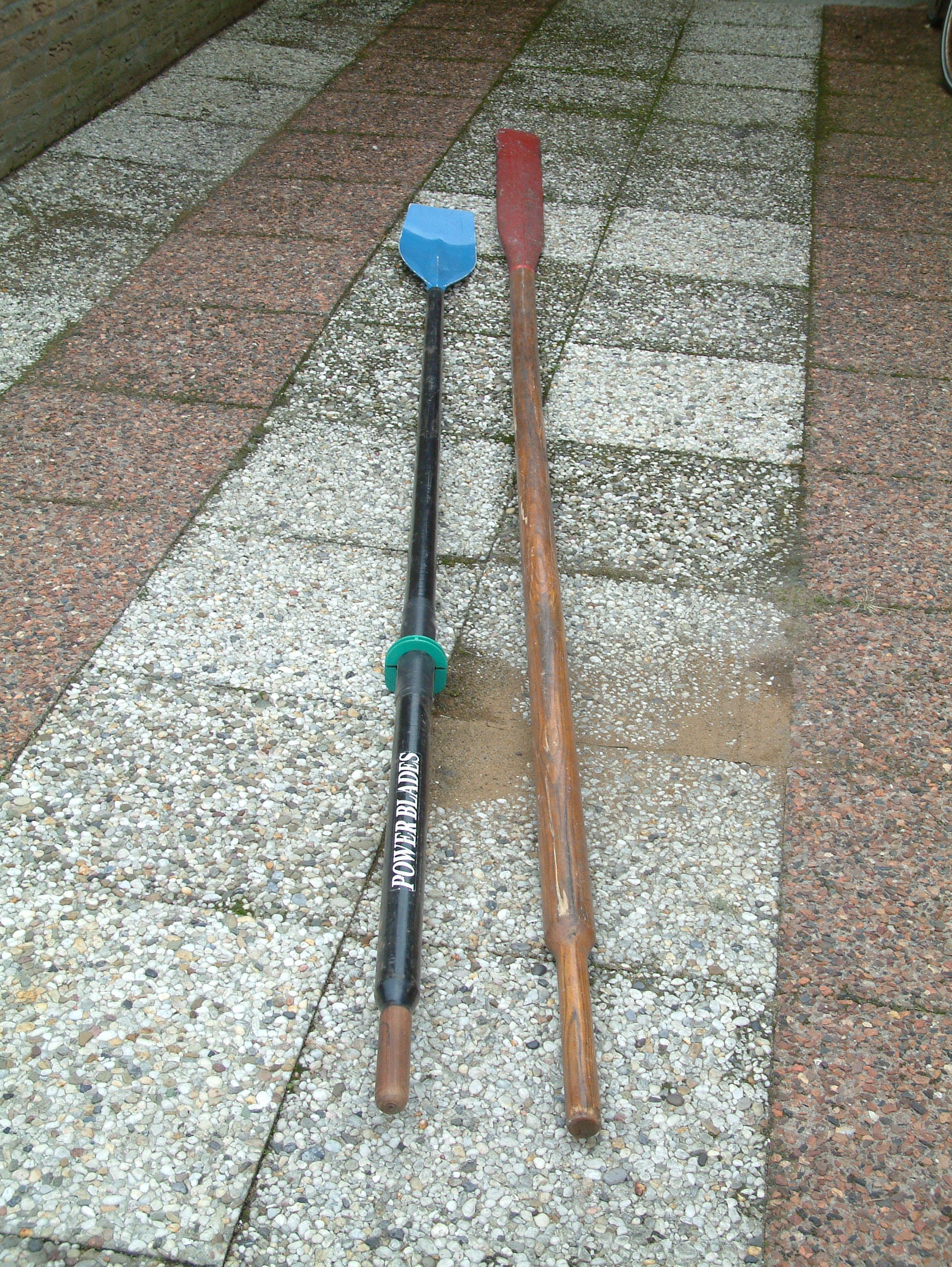 Het verschil tussen een roei- en een wrikriem